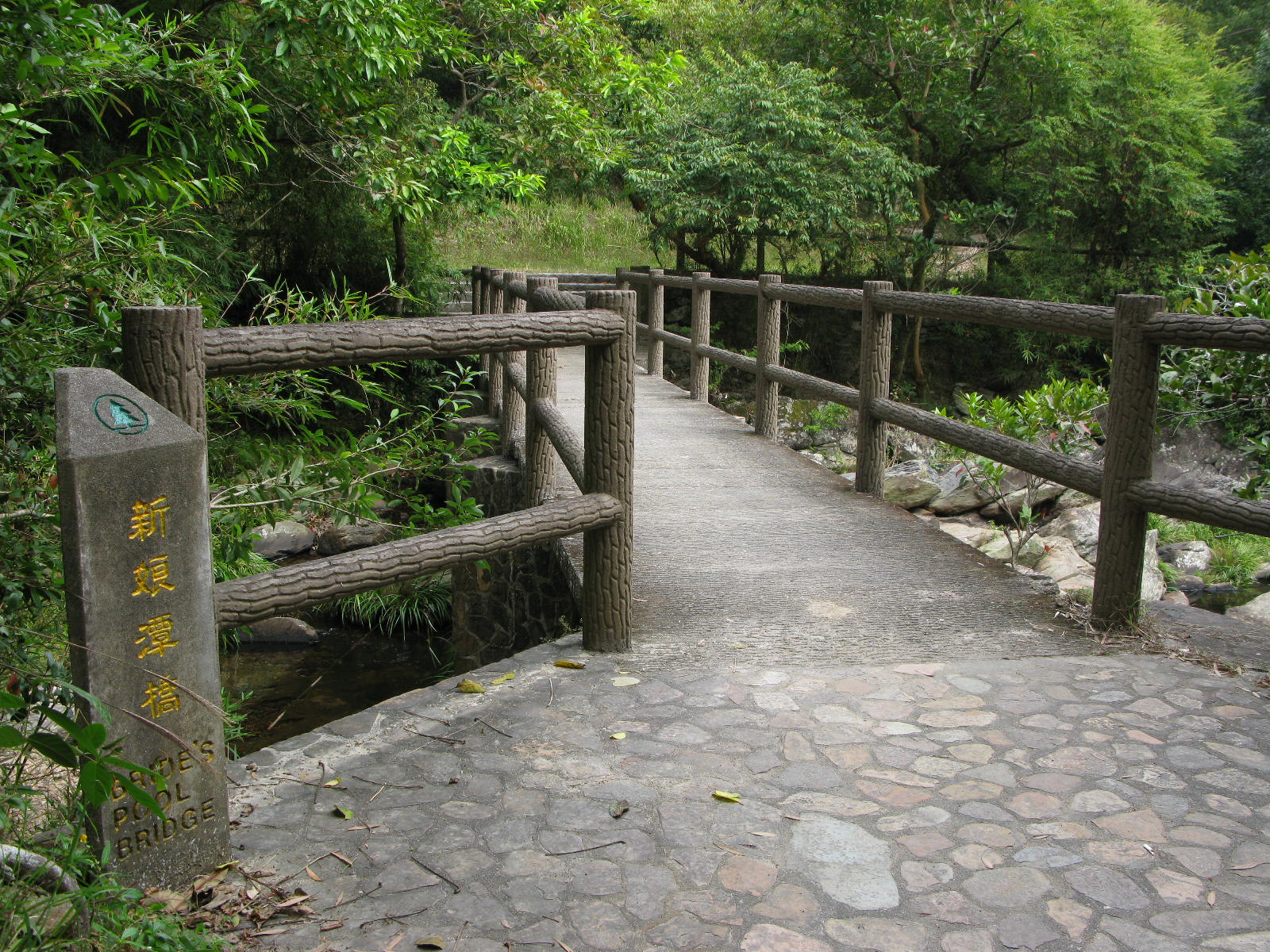 香港新界北區新娘潭自然教育徑內新娘潭橋